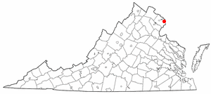 va maps